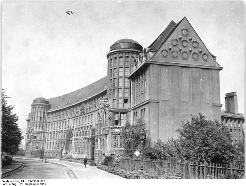 Leipzig, "Deutsche Bücherei" Zentralbild Bez. Redaktion Leipzig Wjt-Th 35 Motive 23.9.55 Die Deutsche Bücherei in Leipzig - Sammelstätte deutschen Schrifttums siehe Begleittext U.B.s.: Außenansicht der Deutschen Bücherei in Leipzig.